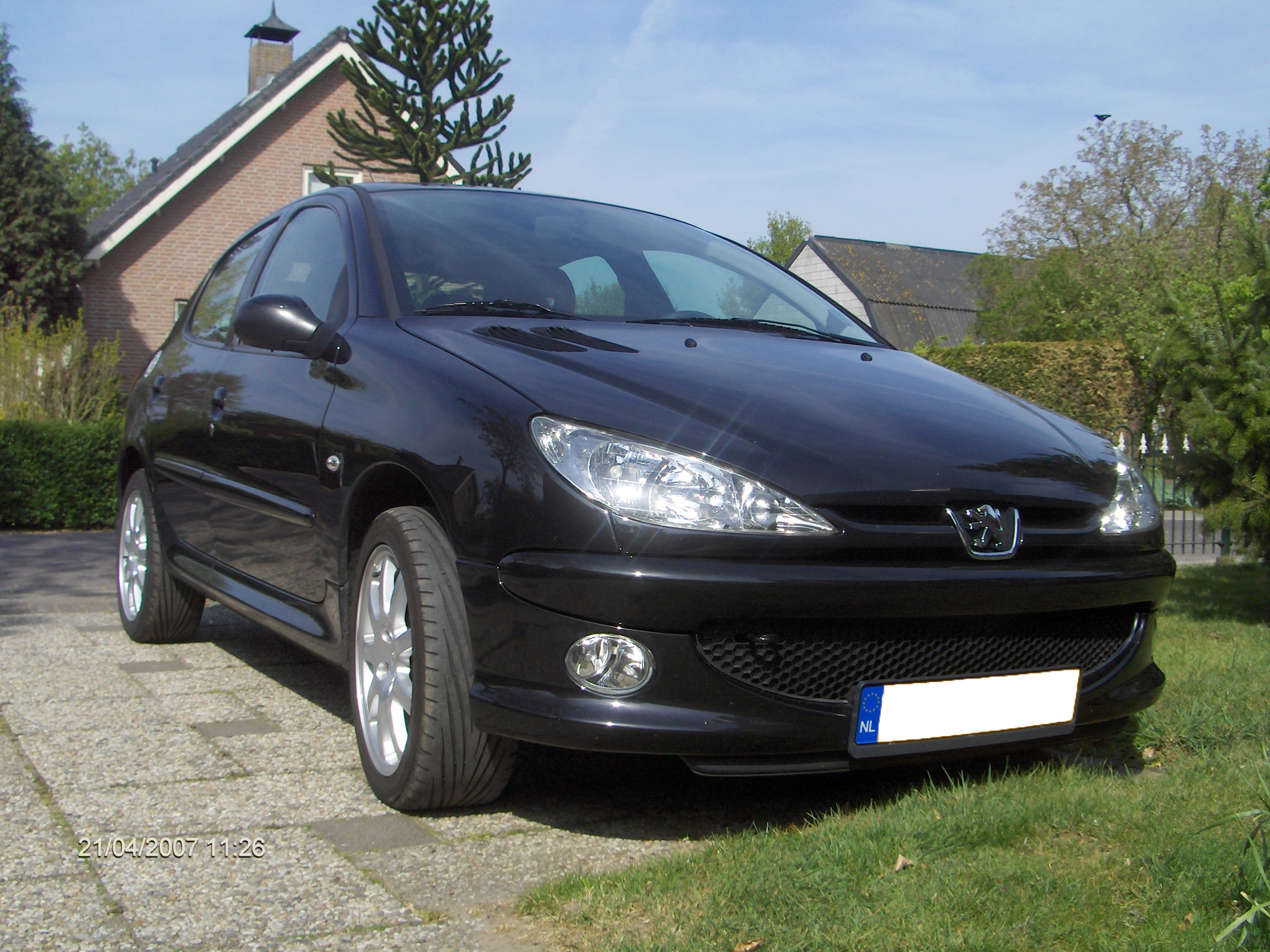 Peugeot 206 uit 2006